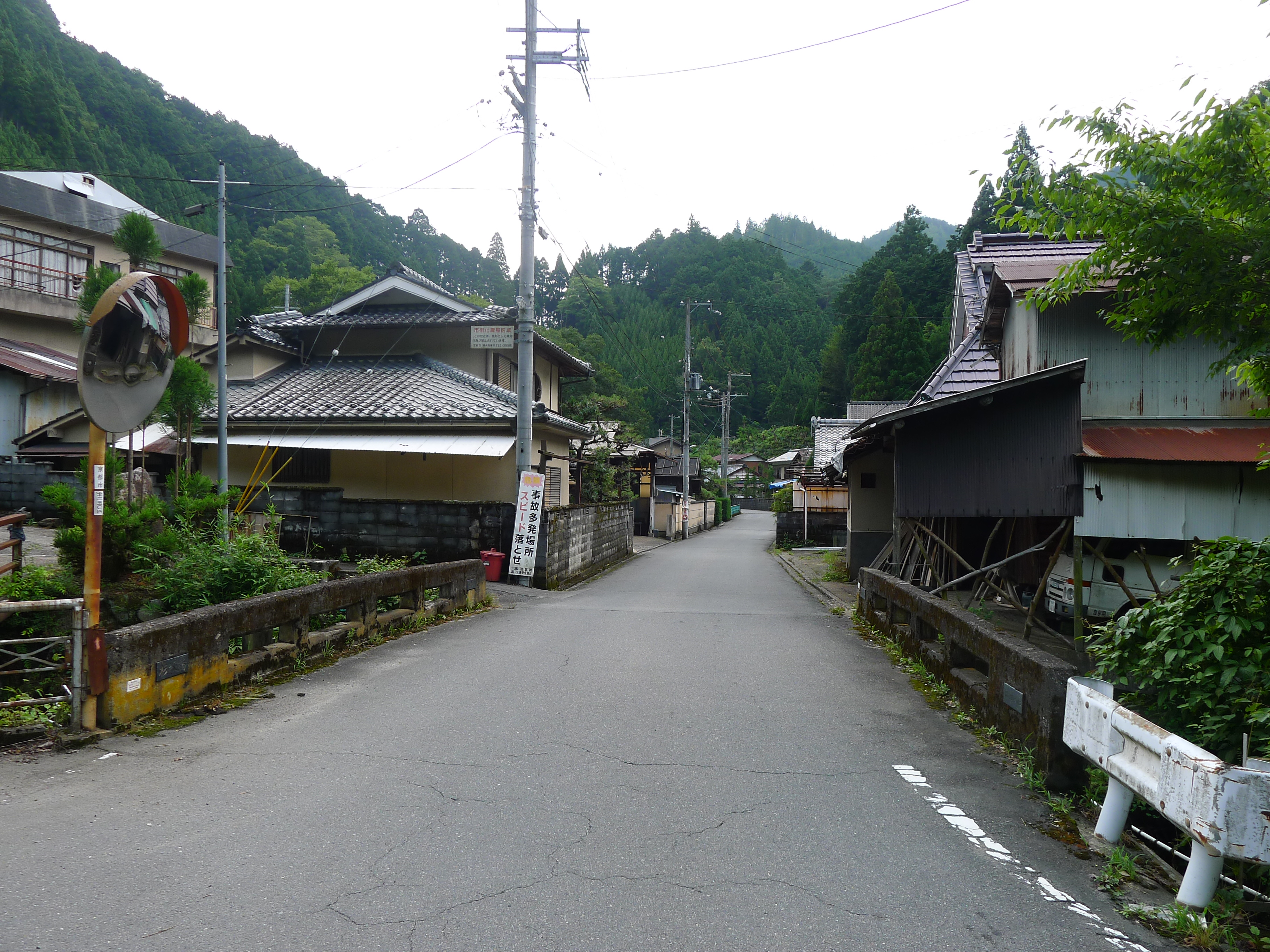 京都市北区の杉坂集落を通る京都府道31号西陣杉坂線